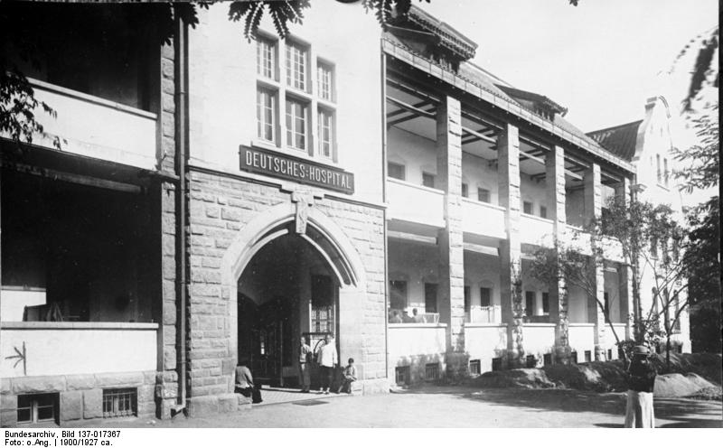 China, Peking.- Deutsches Hospital